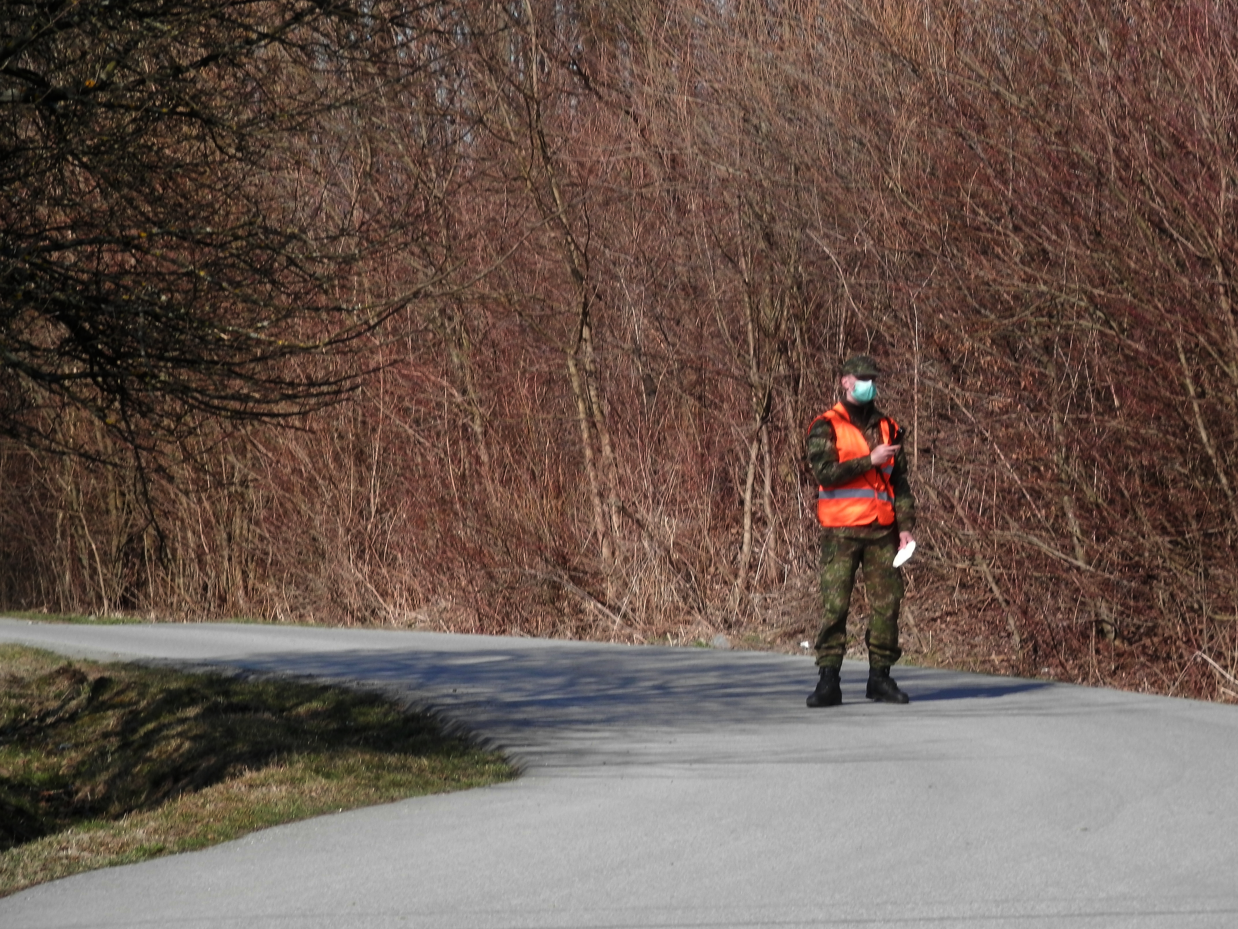 17. marec 2020. COVID-19. Vojenská hliadka pri kontrole. Obec Ruská Nová Ves. Slovensko.